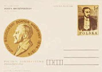 Francobollo dedicato a Josef Brudzinski